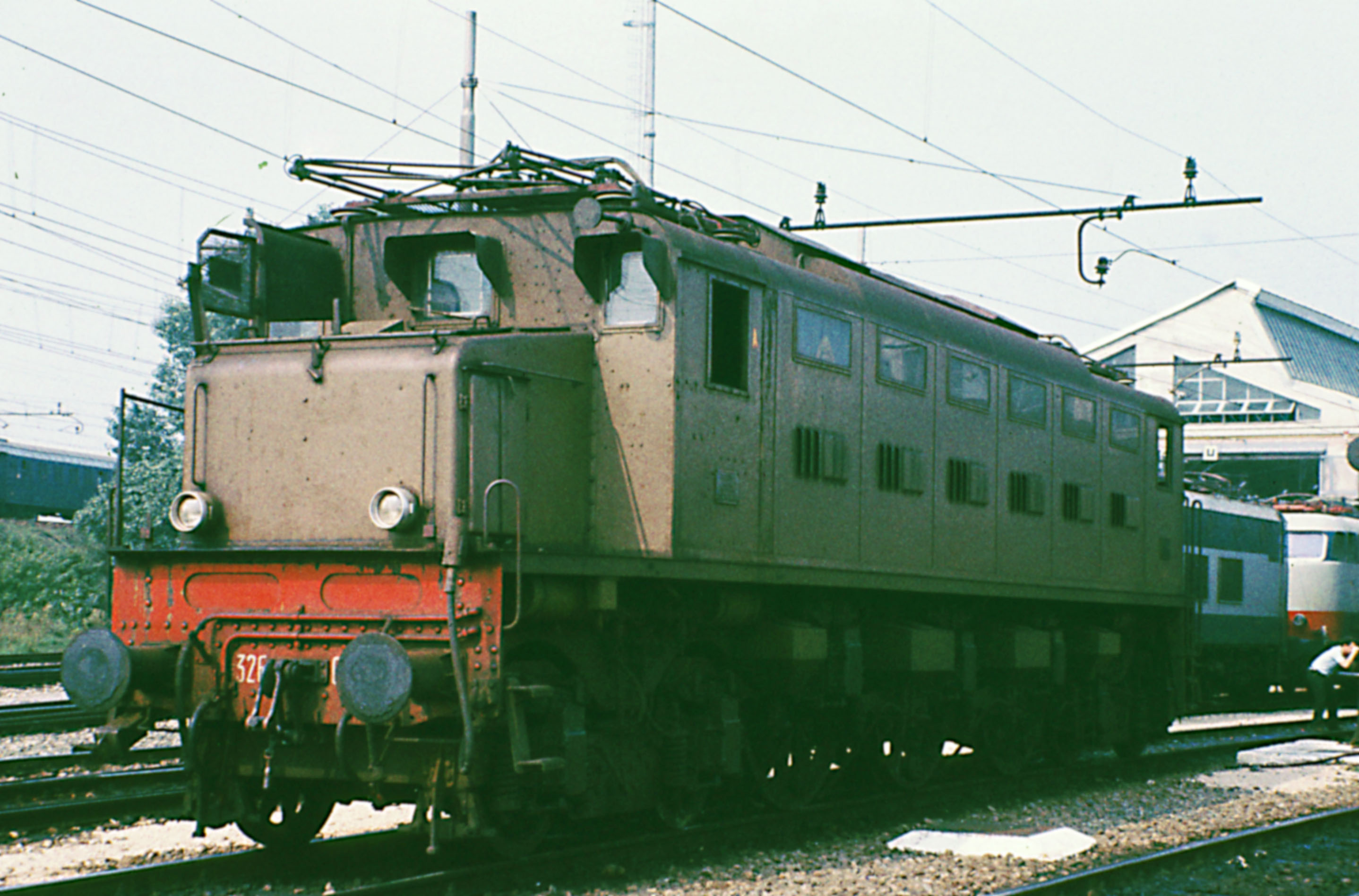 Foto scattata da Sandro Baldi di Bologna. Deposito Locomotive di Bologna Centrale - Anno 1980 circa - Inserita da Utente:Horatius Il locomotore E326 che appare nella foto è uno dei dodici esemplari costruiti. Da altra foto :Immagine:Locomotore_E326_005.jpg si evince che trattasi del loc. 326.005